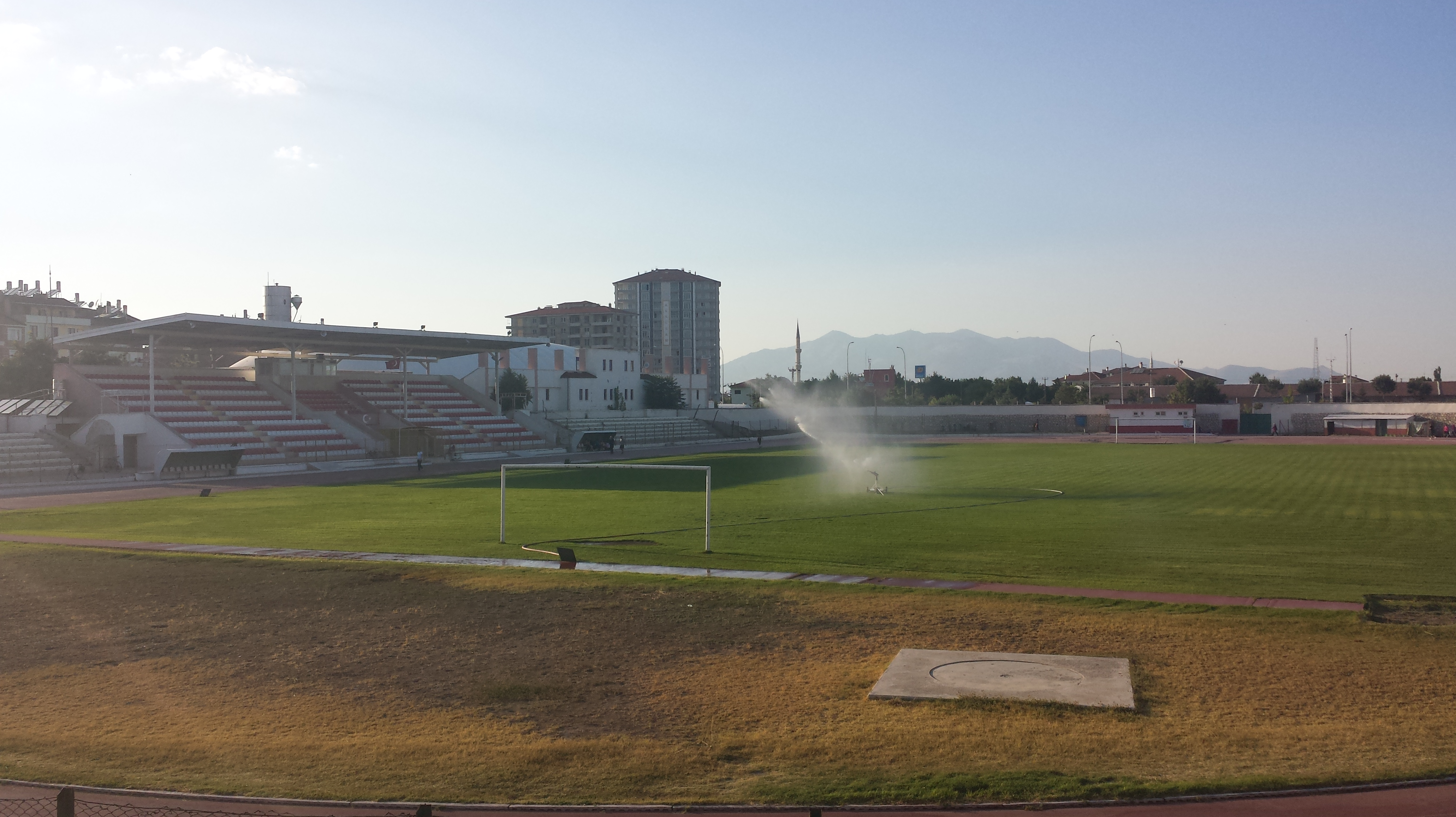 Kemal Kaynas Stadyum Simgesidir